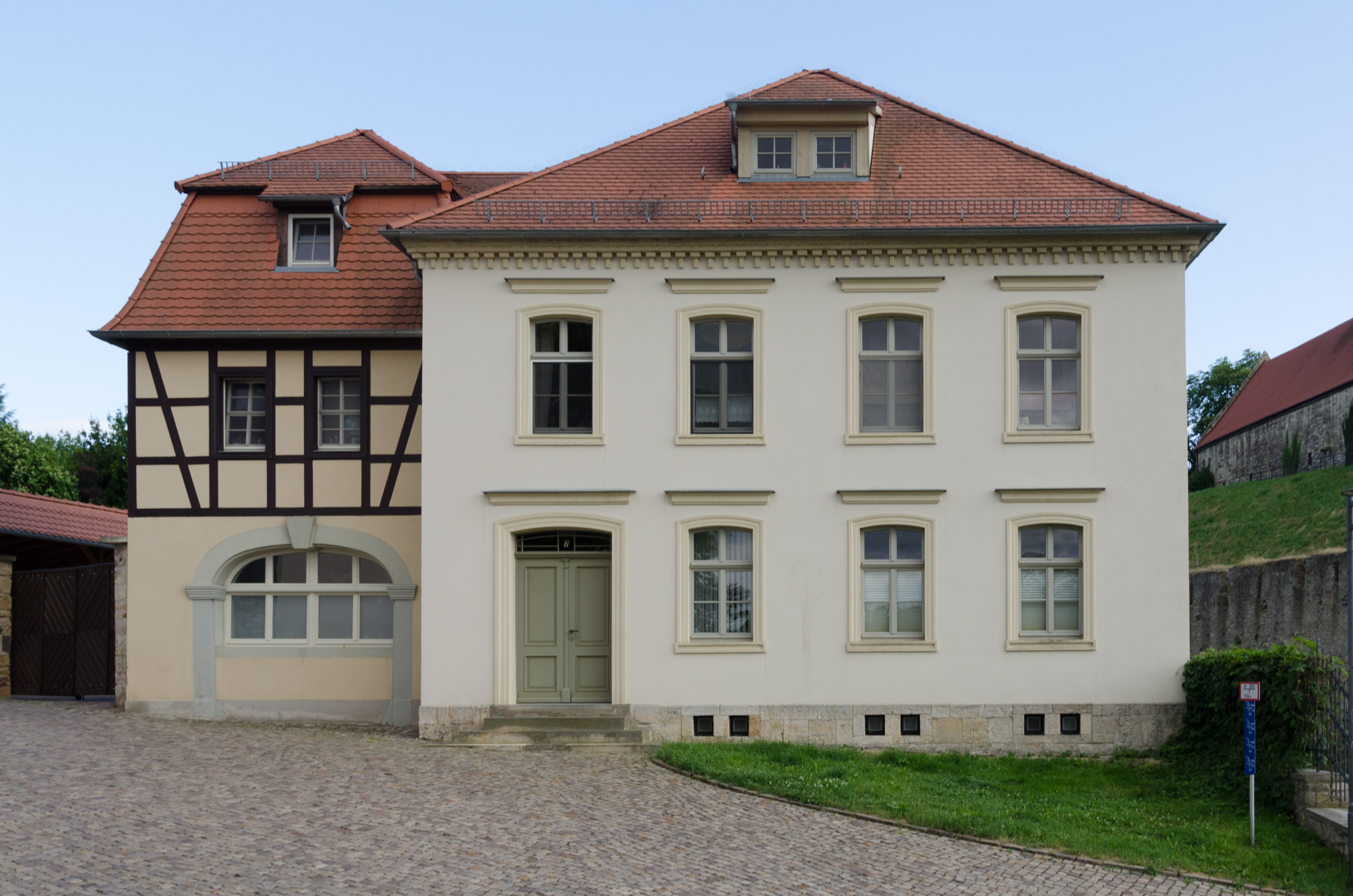 Querfurt, Burgstraße 7